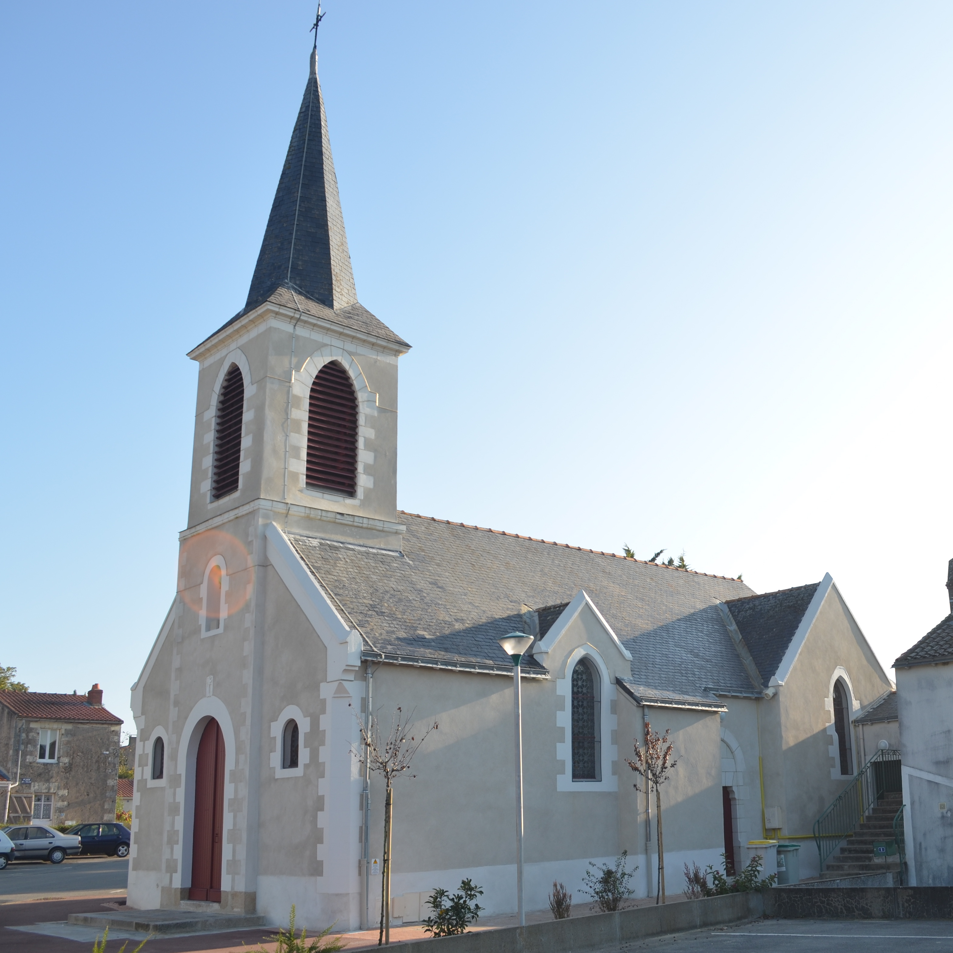 Eglise - Saint-Léger-les-Vignes (Loire-Atlantique)